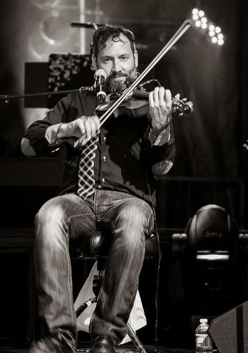 Avec Le Vent du Nord